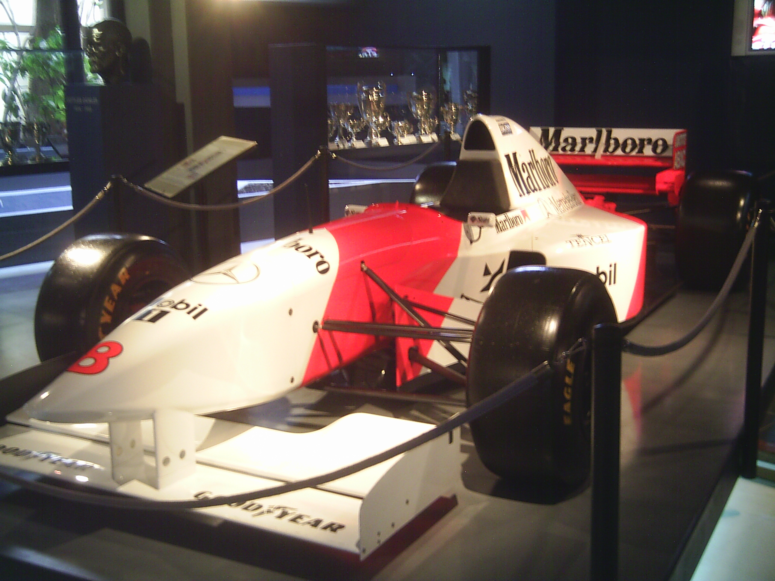 Museo del automovilismo Juan Manuel Fangio